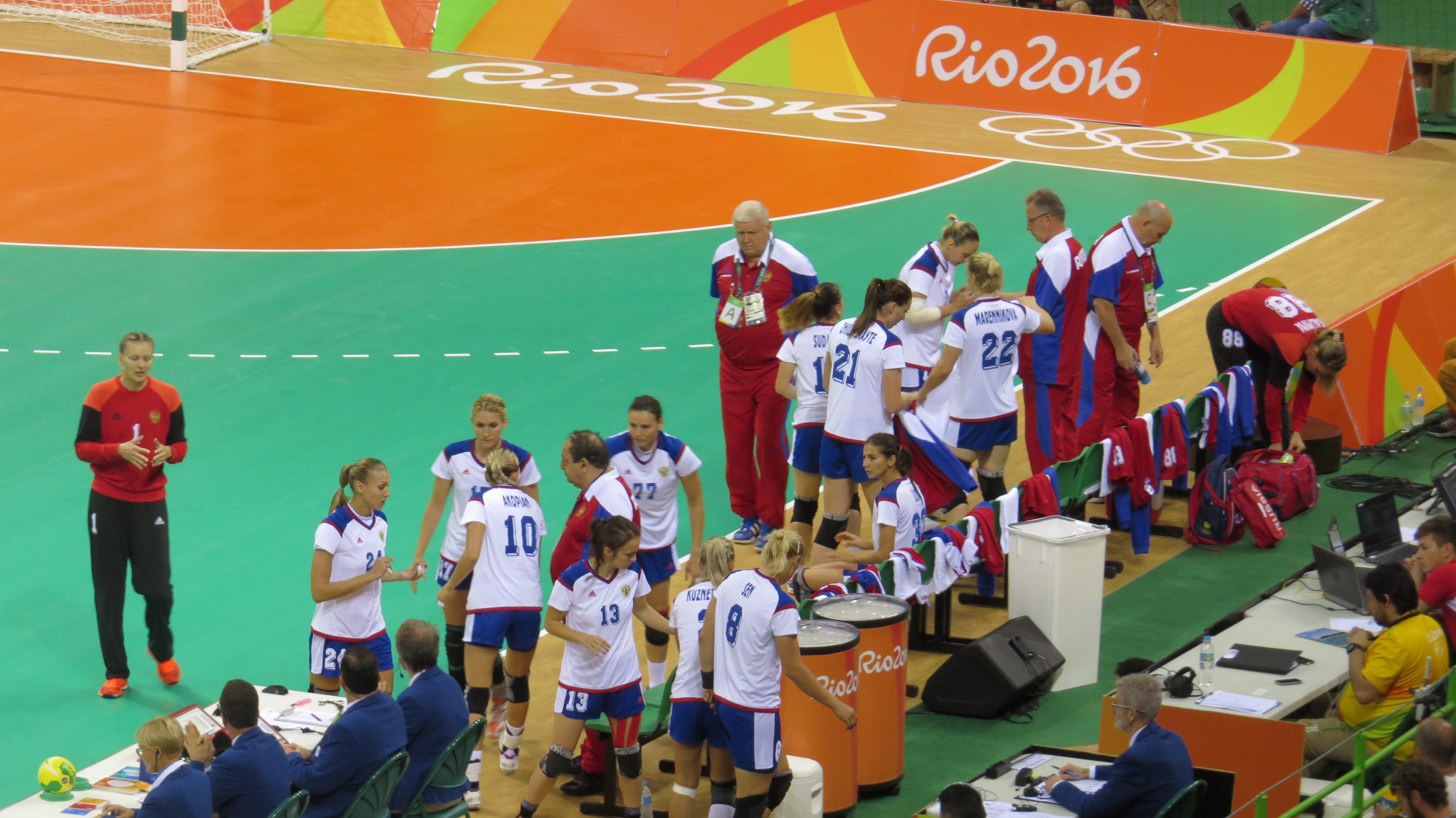 Rio 2016. sx 98